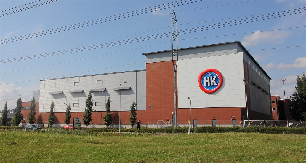 HKScan Oyj:n (HK Ruokatalo) tuotantolaitos Vantaan Pakkalassa. Rakennus sijaitsee lähellä Kauppakeskus Jumboa, aivan sen länsipuolella.